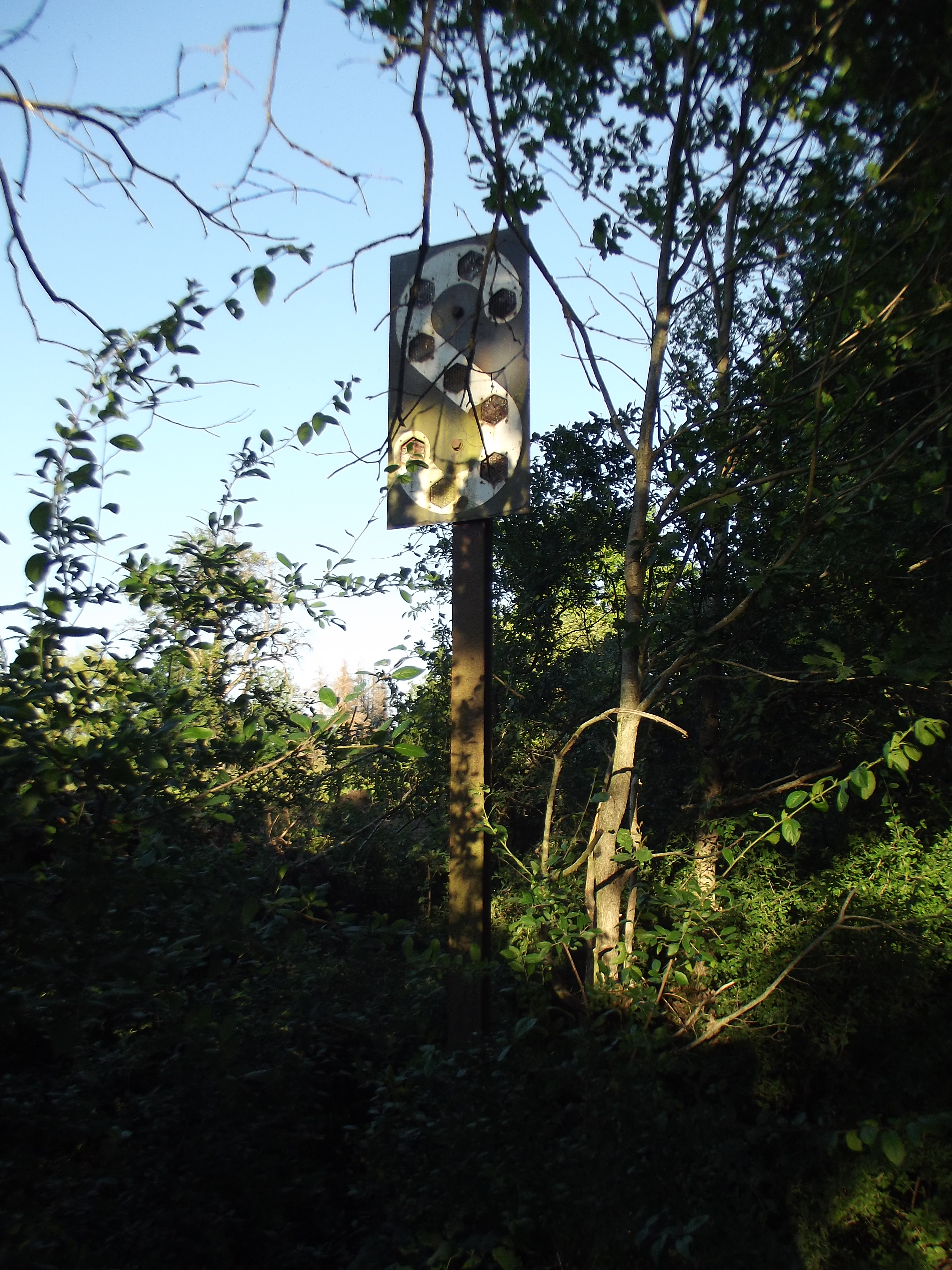 Cette pancarte indique au conducteur d'utiliser l'avertisseur sonore: le "Sifflet", afin d'avertir l'arrivée du train avant un passage à niveau ou bien en amont d'une zone où la visibilité est limitée. (voir l'article Signalisation ferroviaire en France)